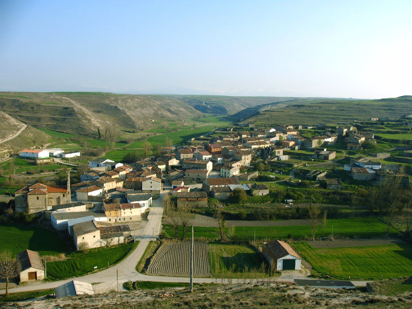 Quintanaloranco